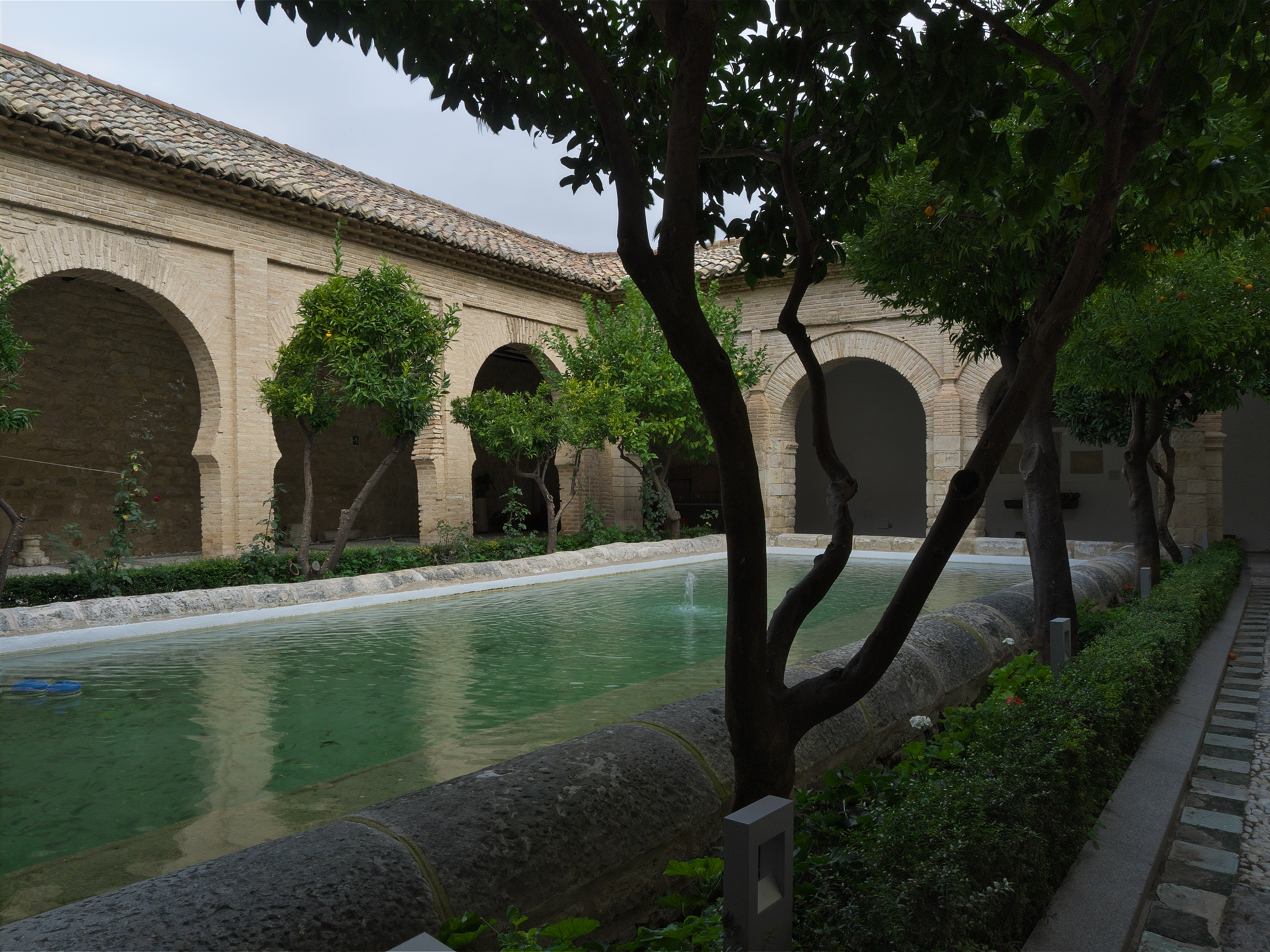 Primitivo patio de abluciones de la mezquita emiral de Abderramán II